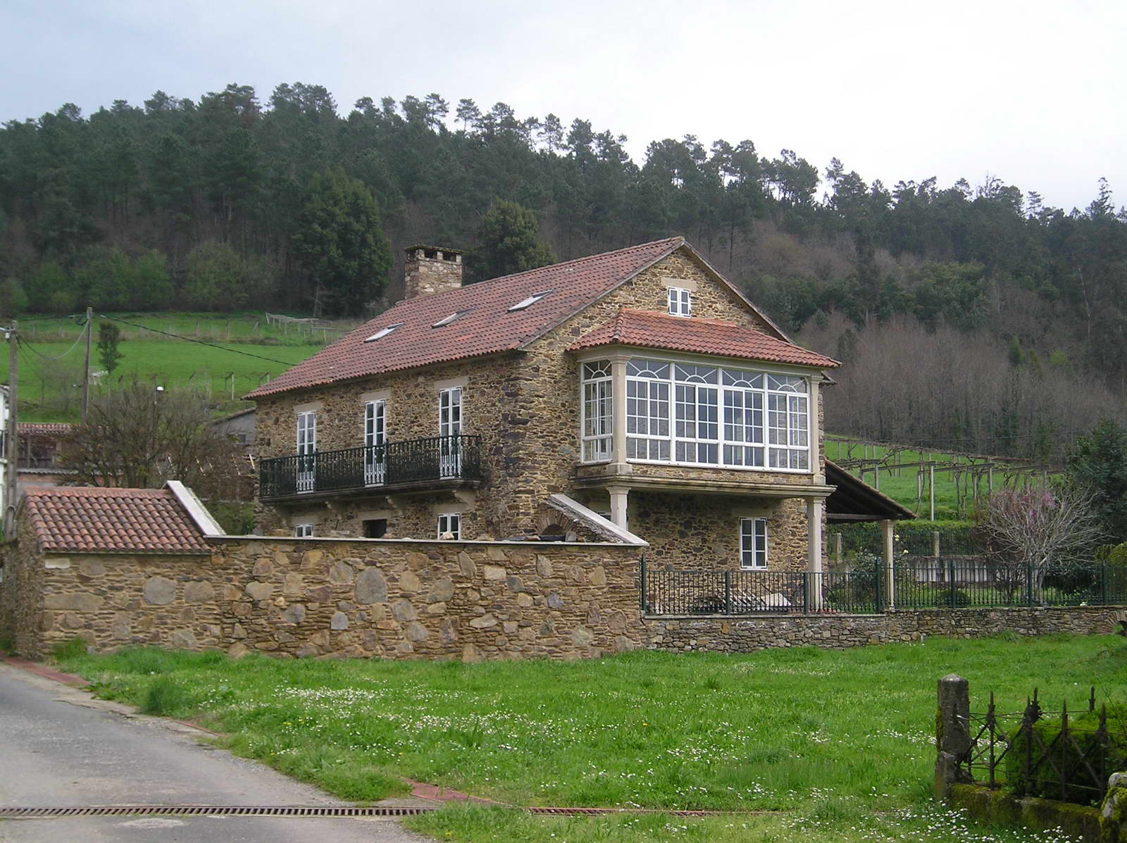 Concello de Boqueixón. Casa particular Upload by: User:Lmbuga